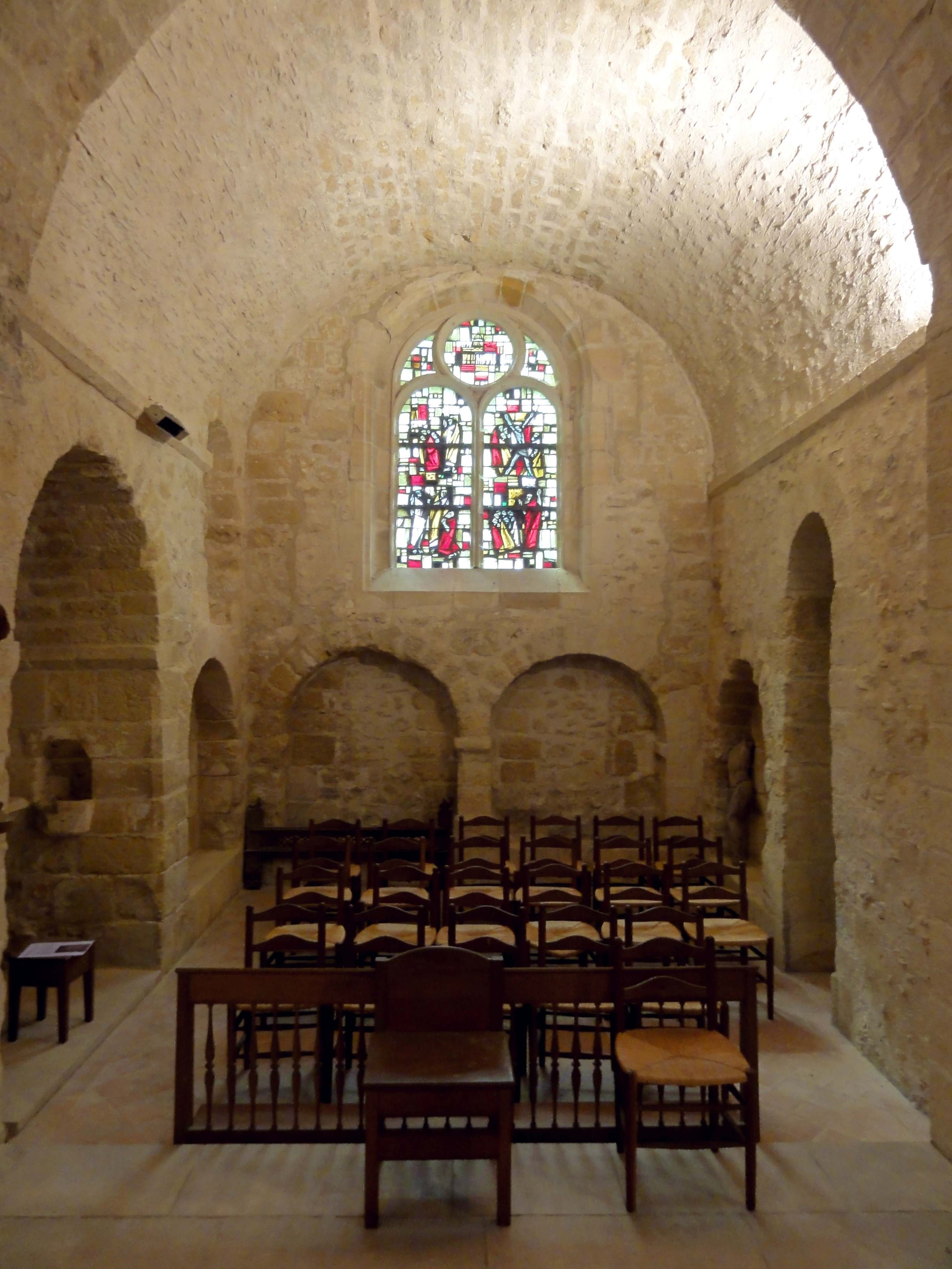 Intérieur de l'église - voir titre.